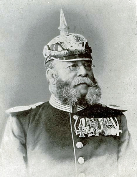 Der preußische Militärmusiker Friedrich Wilhelm Voigt